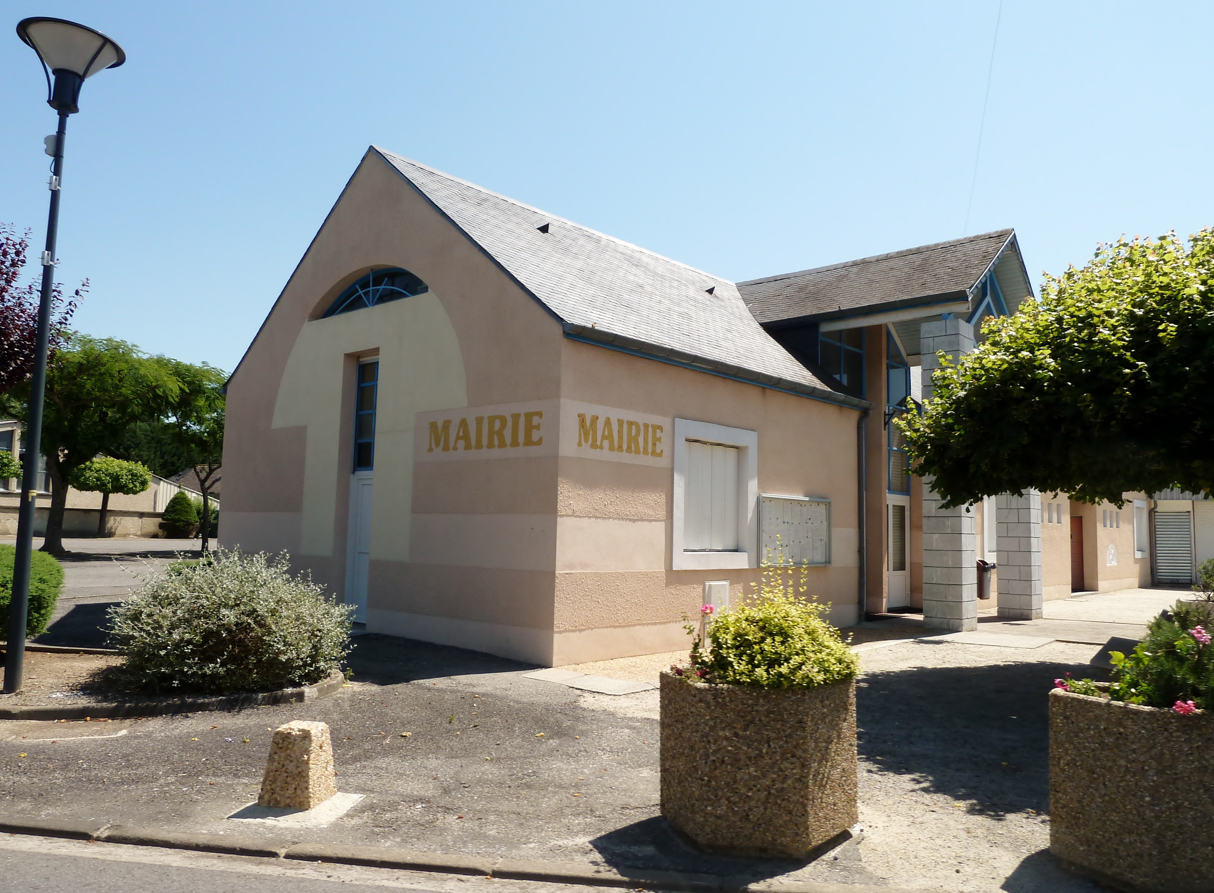 Ousse, France